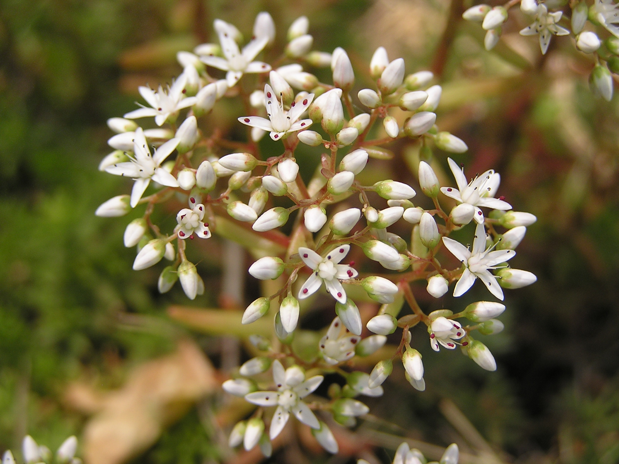 Растение в Седово.